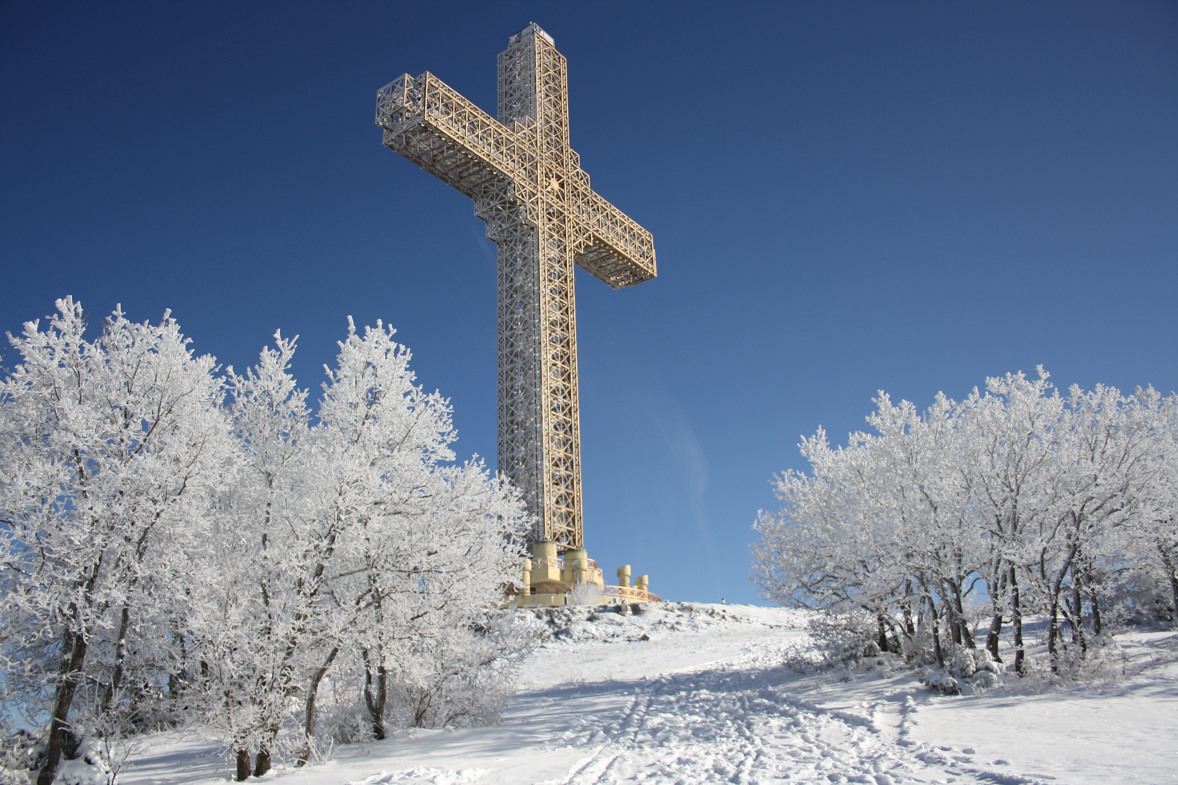 Vodno